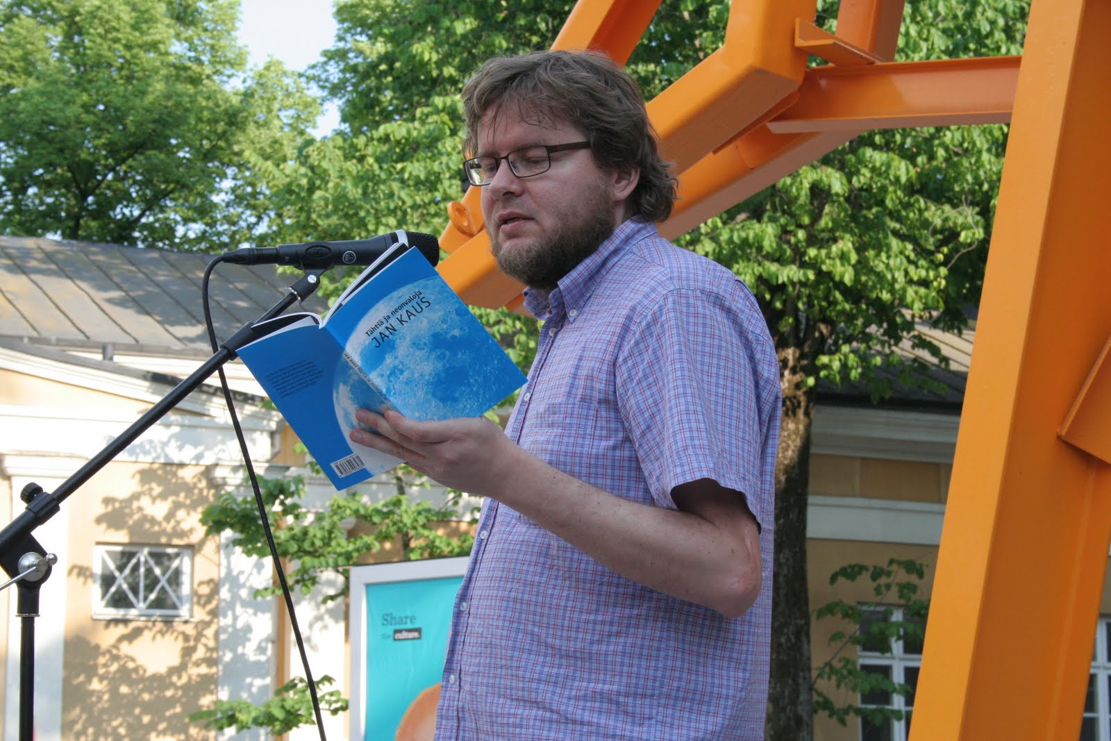 Jan Kaus Turus (Soomes) Littera Baltica festivali raames.